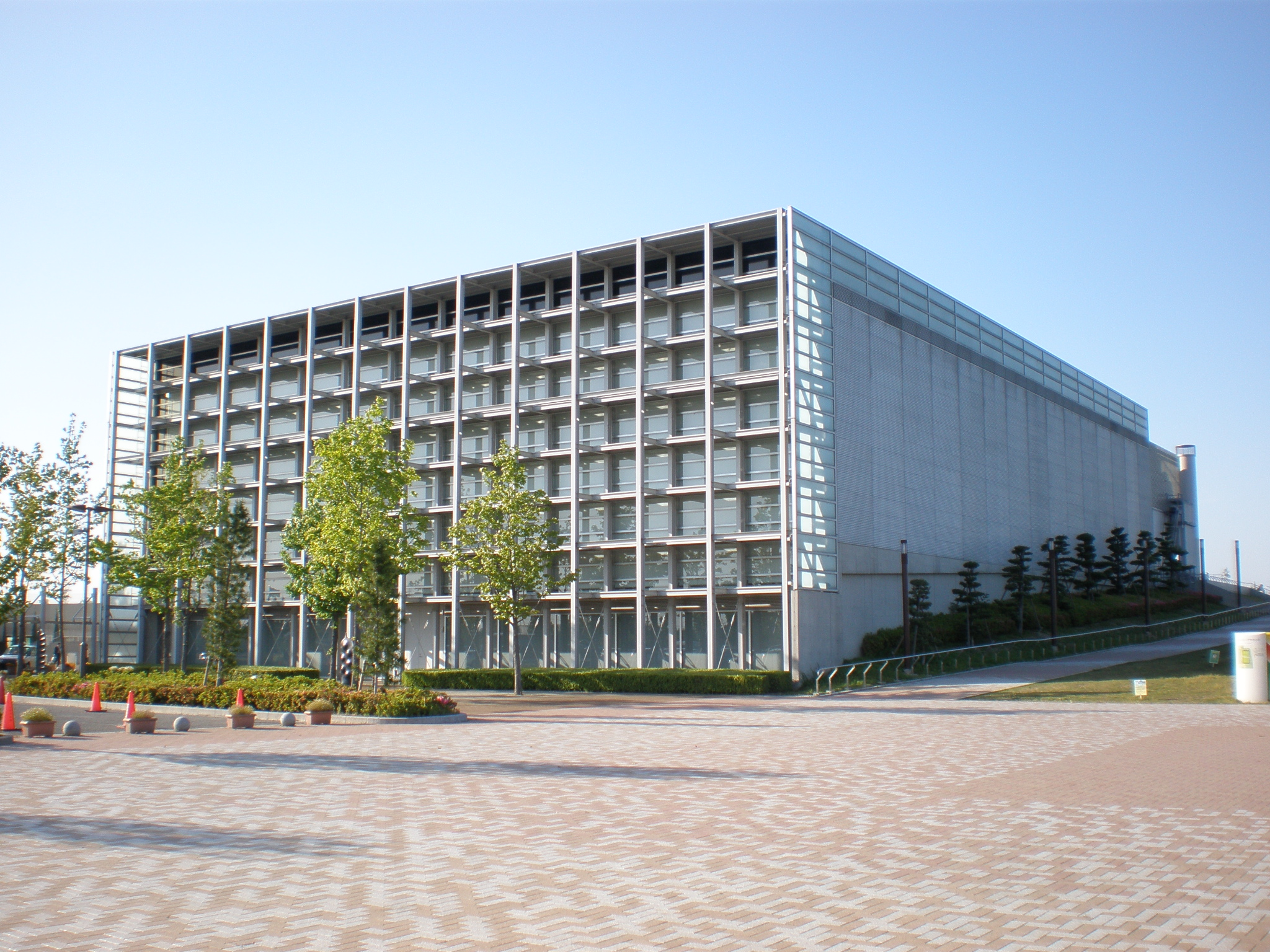 愛知県小牧市の小牧市スポーツ公園にあるパークアリーナ小牧